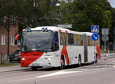 Kungsgatan, Hudiksvall 2014-07-03